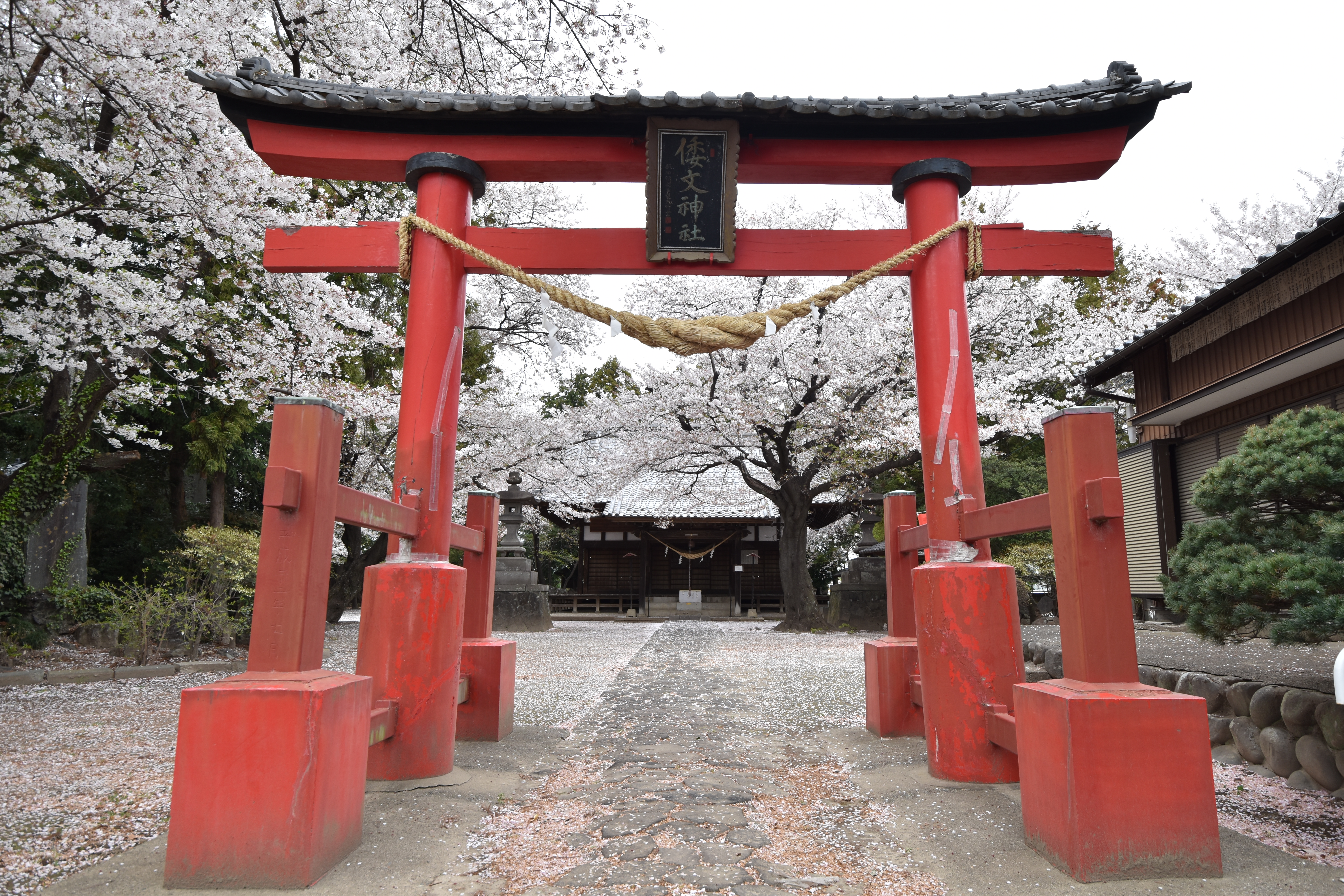 倭文神社の鳥居（群馬県伊勢崎市）